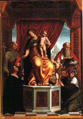 Moietta, pala del 1521